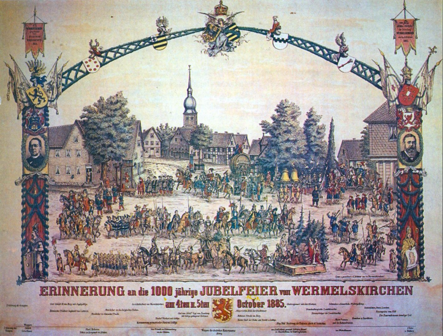 Festzug aus Anlass der 1000jahrfeier von Wermelskirchen